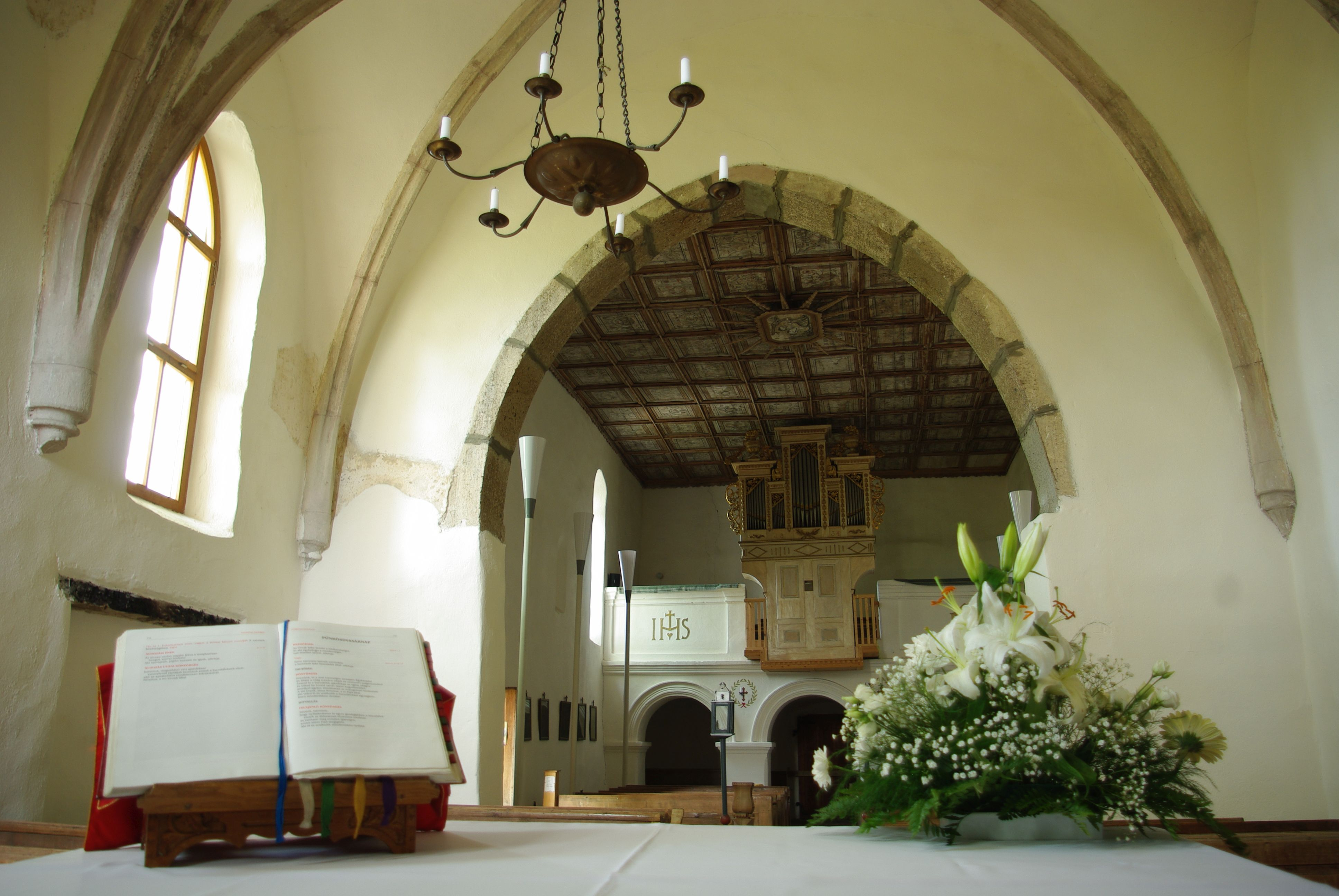 Biserica romano-catolică „Sf. Ioan Botezătorul” 01